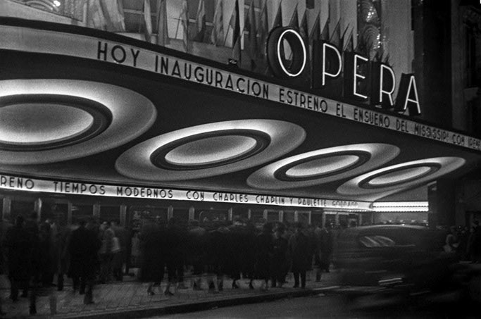 Frente del Cine-Teatro Ópera con la película Tiempos modernos en la cartelera de estrenos, Buenos Aires, en 1936.